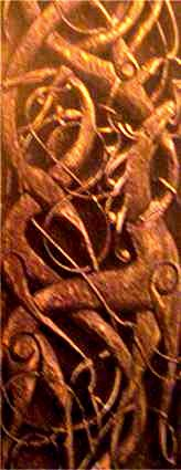 Reliëf Nidhogr, binnenwand Stafkerk Urne (Sogn, Noorwegen)